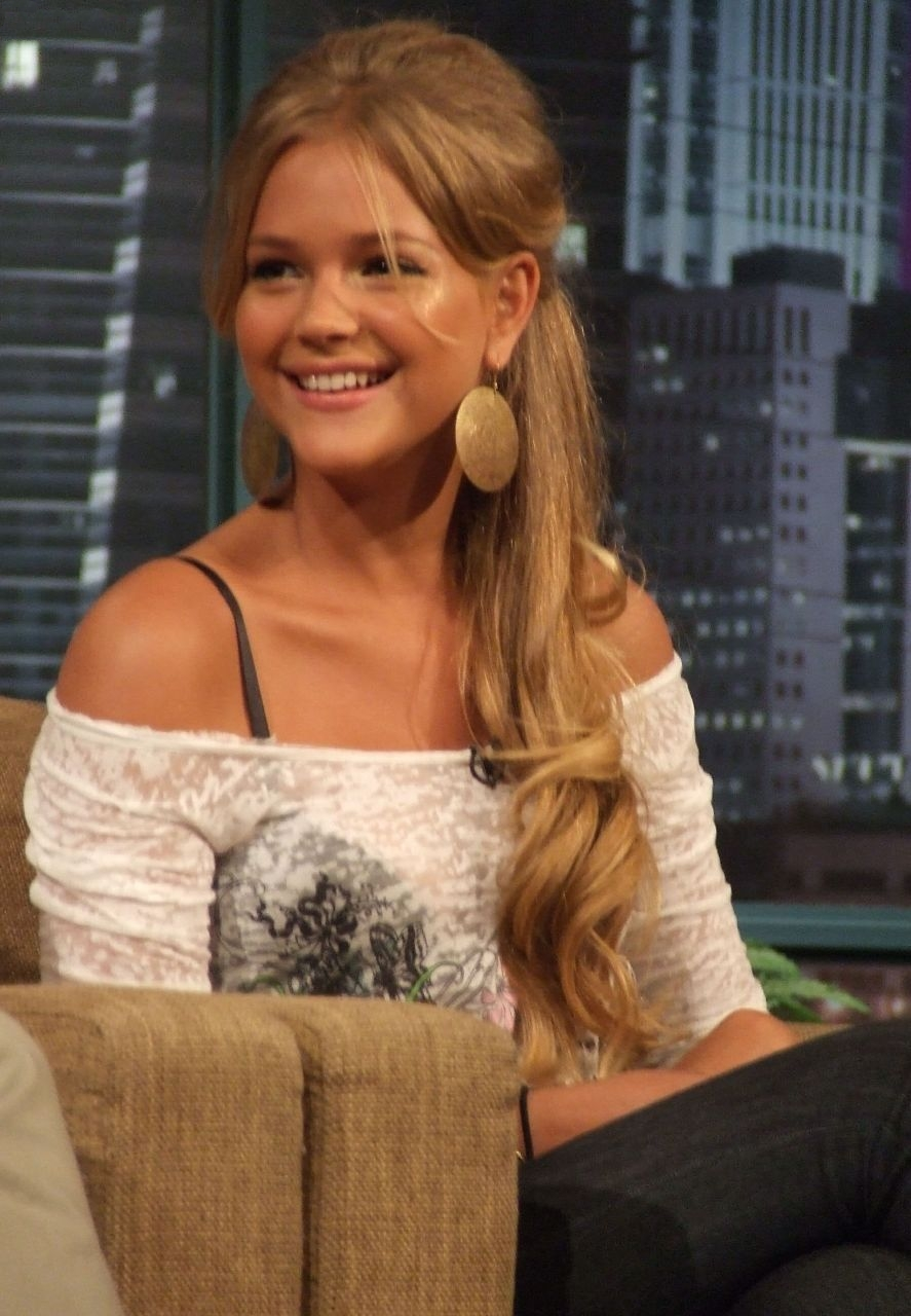 Israeli model and television host Esti Ginzburg